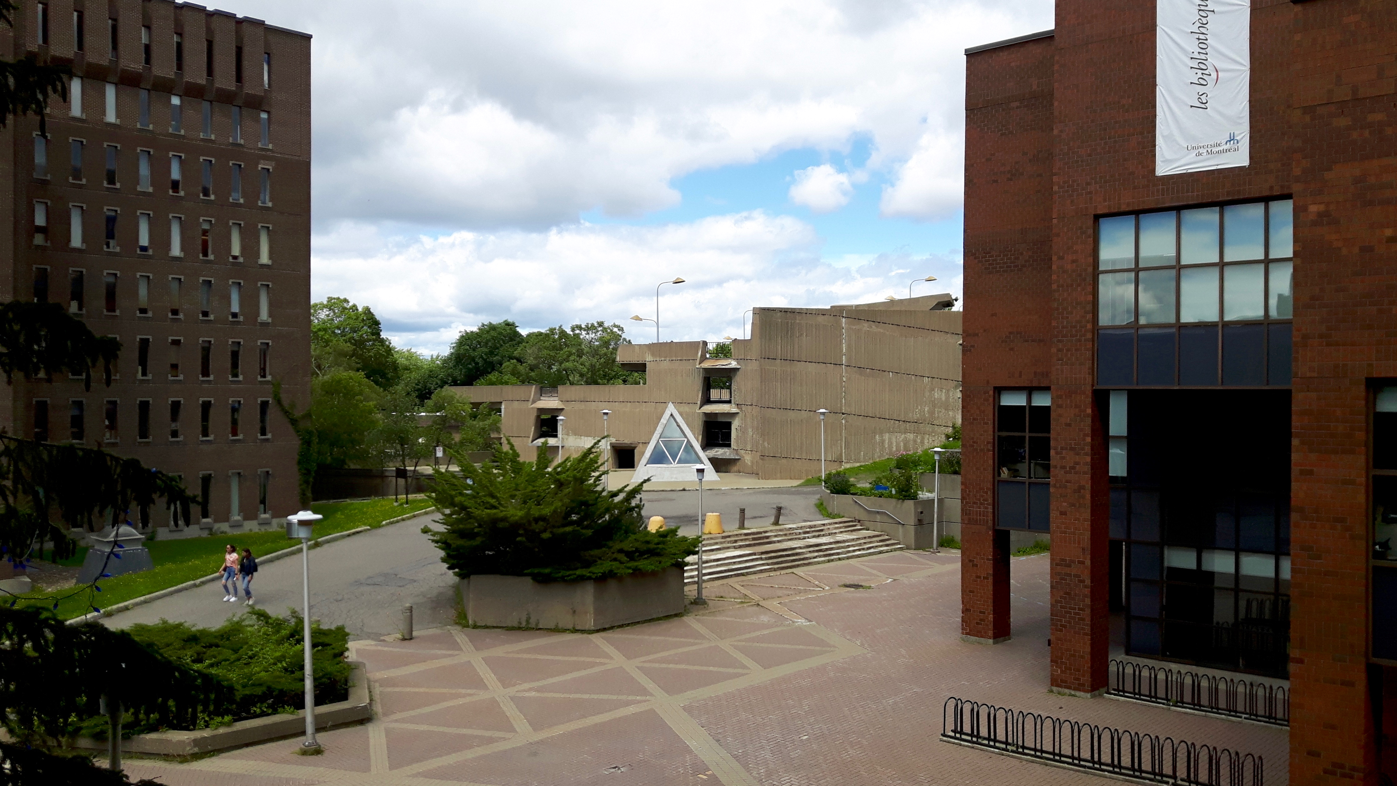 Place de La Laurentienne : pavillon Lionel-Groulx, garage Louis-Collin et pavillon Samuel-Bronfman Université de Montréal.